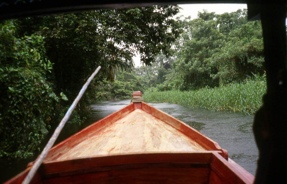 Refugio de vida salvaje Los Guatuzos, Río San Juan, Nicaragua. 2002